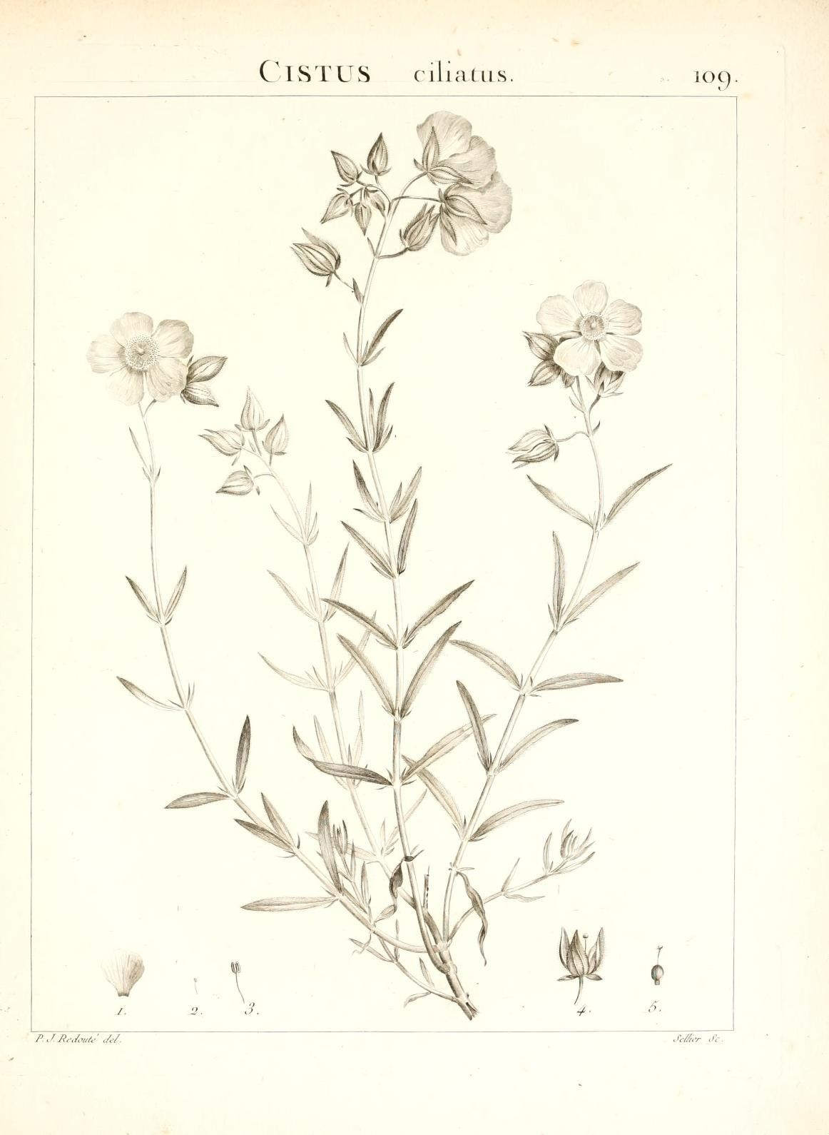 ClSTUS ciluUiLS P.JJi.-J.m(^' cM. Je&r .lc.